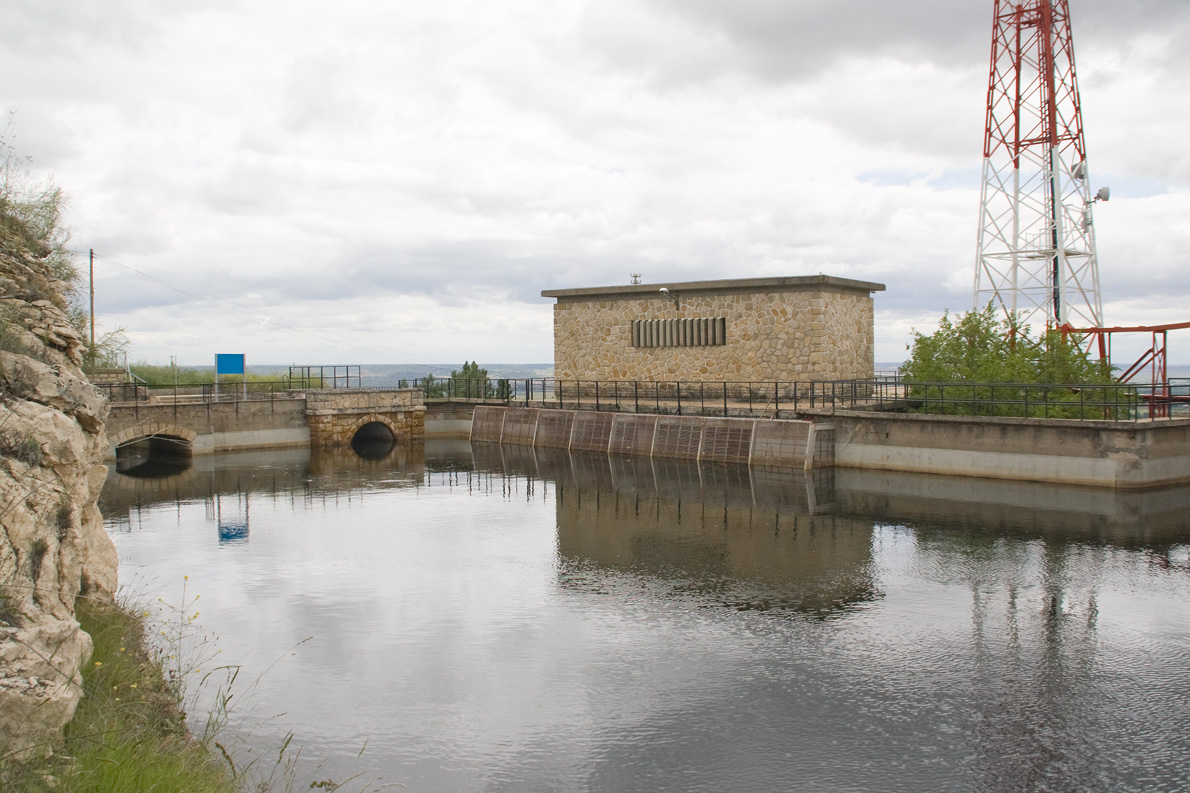 Deposito superior de Torrelaguna. Entrada del Canal del Villar y Canal del Jarama